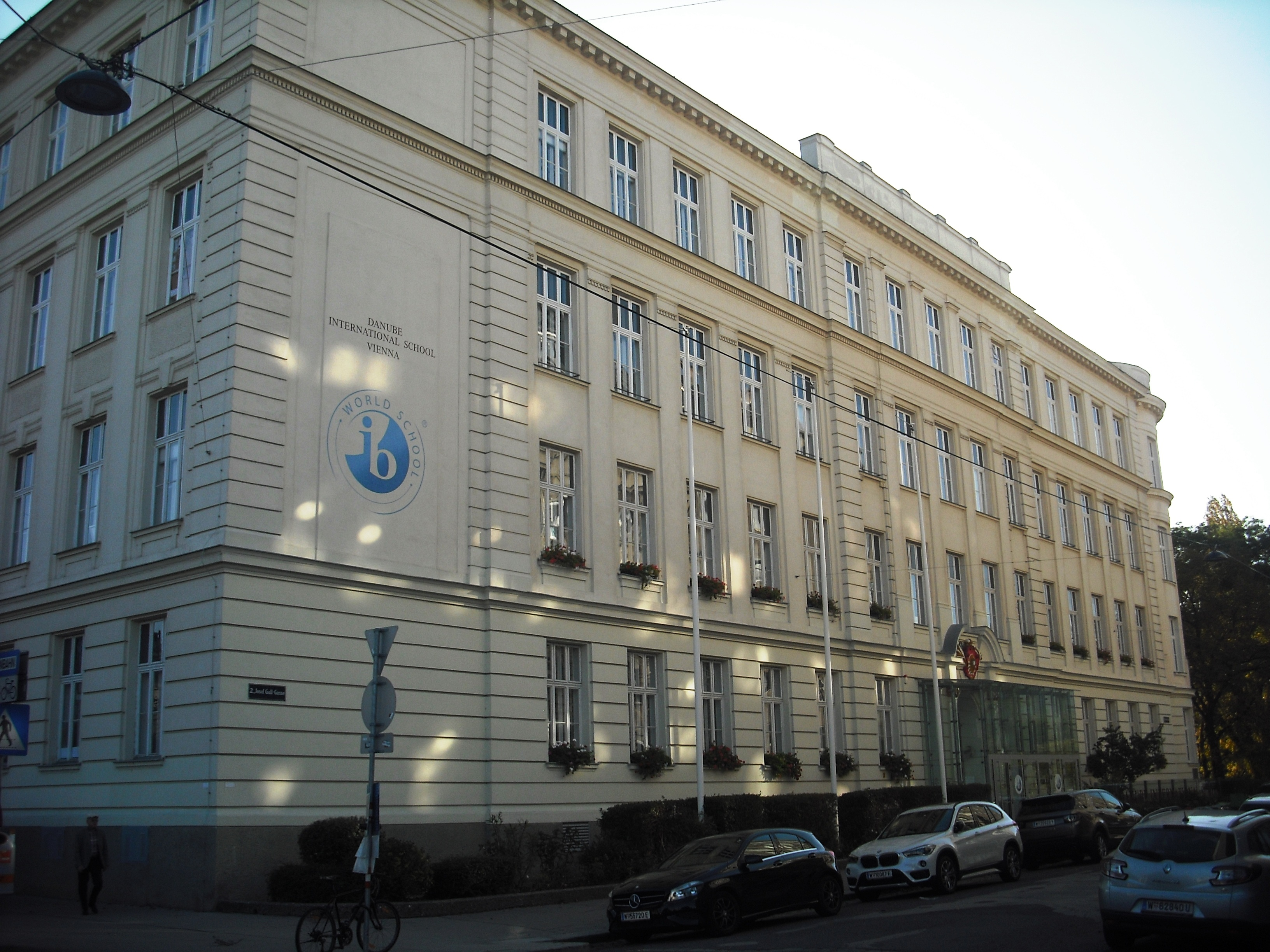 Danube International School of Vienna